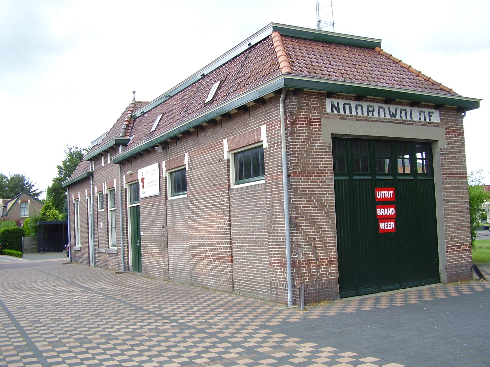 Voormalig tramstation NTM